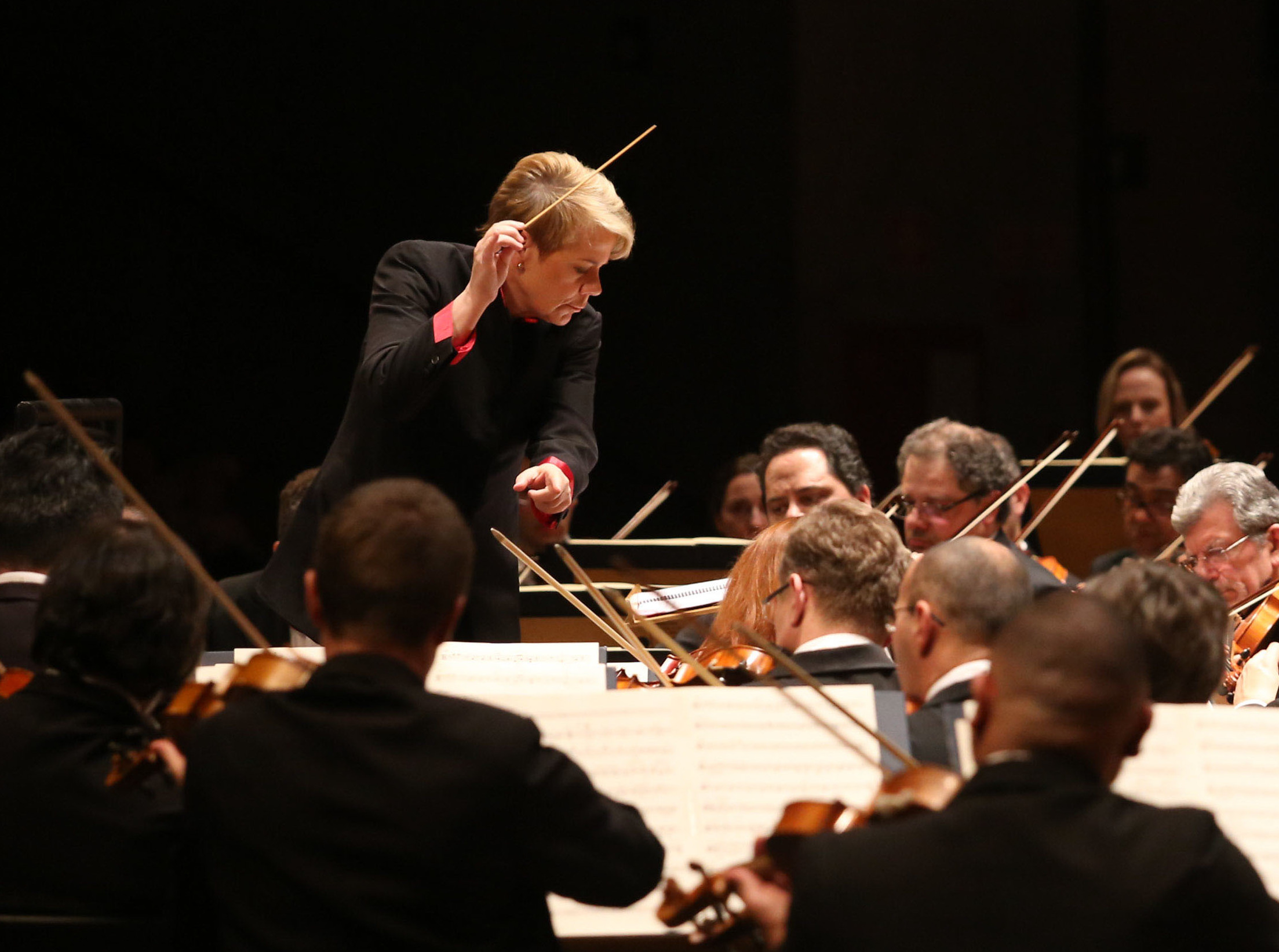 O Governador do Estado de São Paulo, Geraldo Alckmin, participa da abertura do 48º Festival de Inverno de Campos do Jordão; A regente titular da OSESP, Marin Alsop. Local: Campos do Jordão/SP. Data: 01/07/2017. Foto: Gilberto Marques /A2img